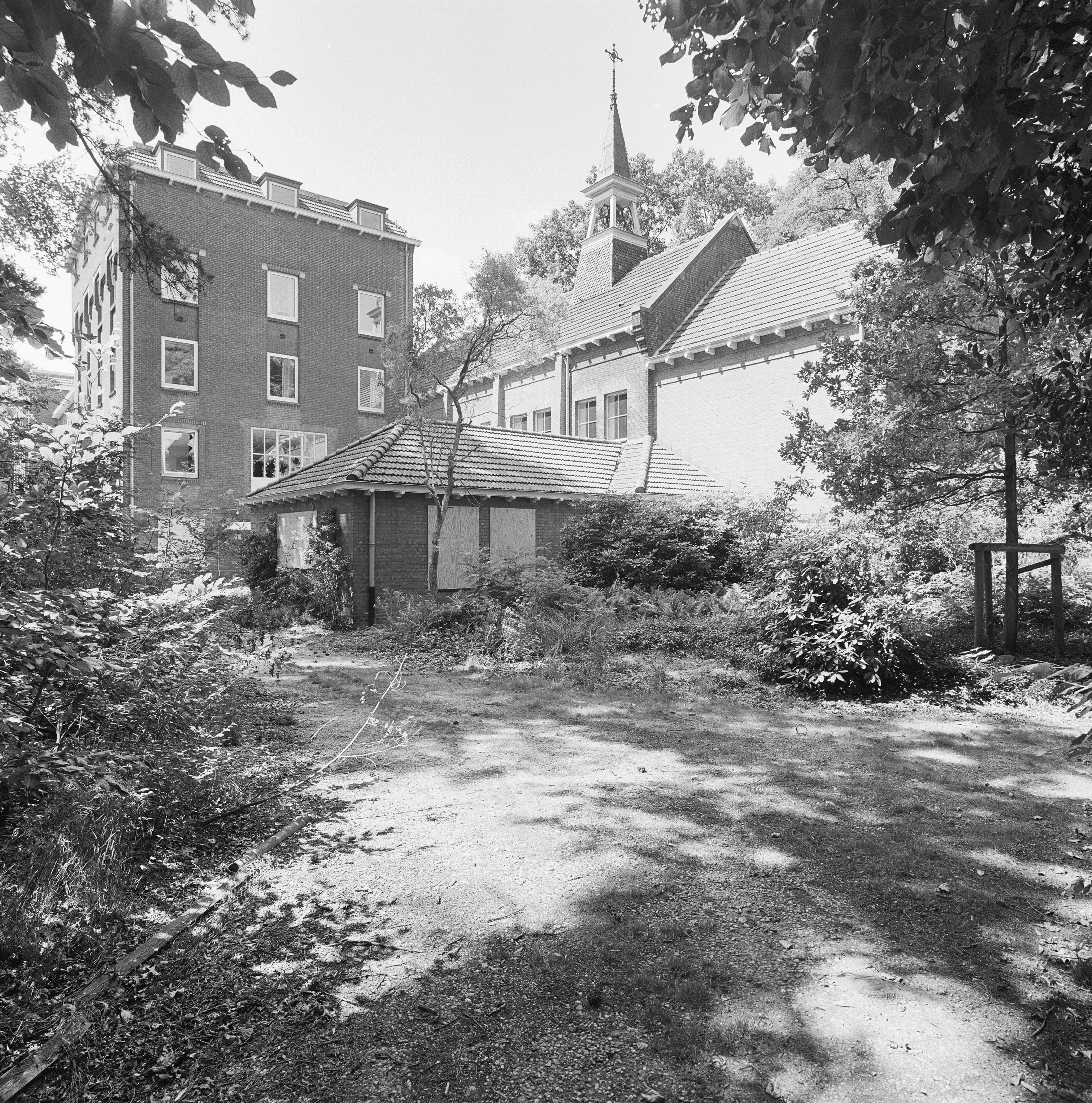 Voormalig Retraitehuis Manresa: Gedeelte naast de voorgevel met klokkentorentje en rechter zijgevel van het hoofdgebouw